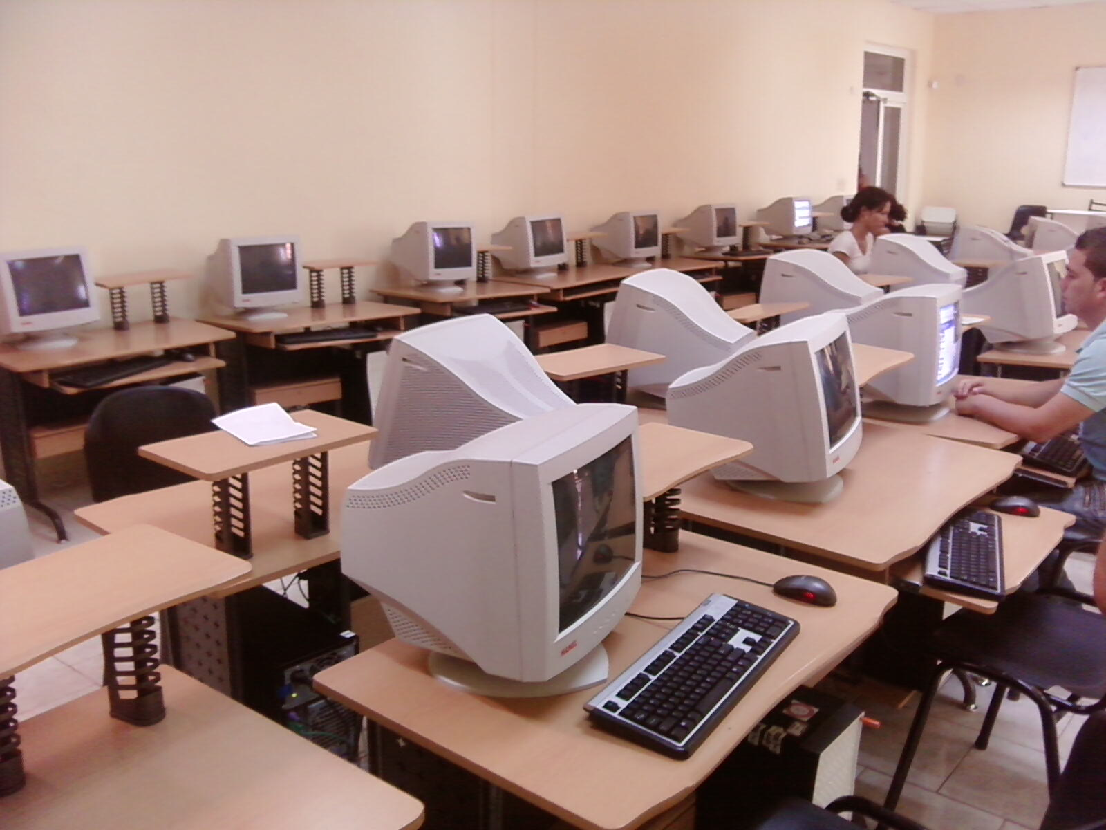 Laboratorios de producción de la Universidad